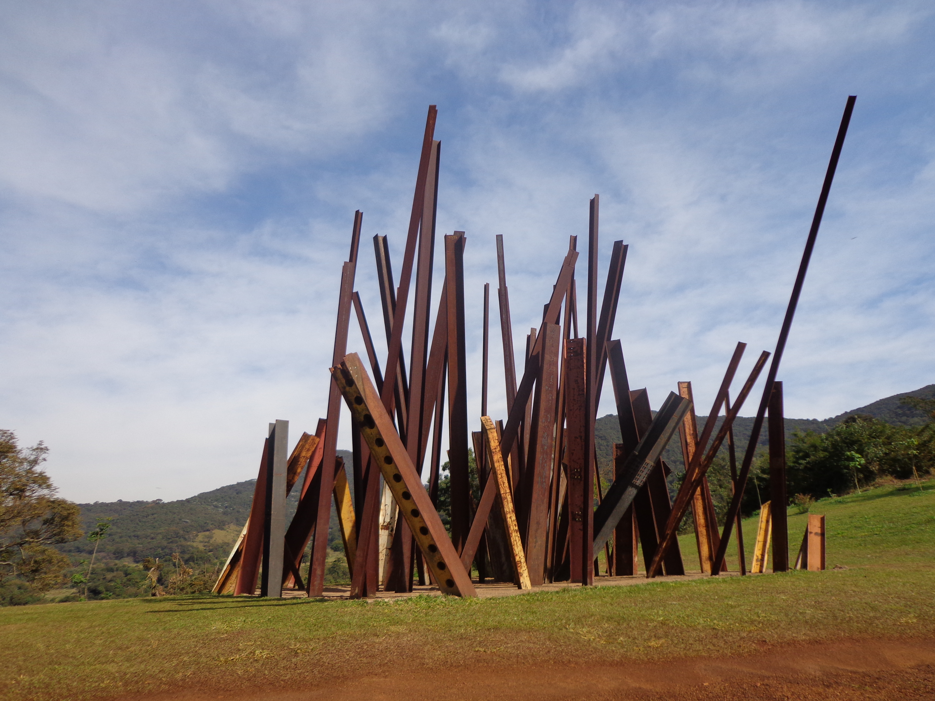 Brumadinho Mg Brasil - Inhotim